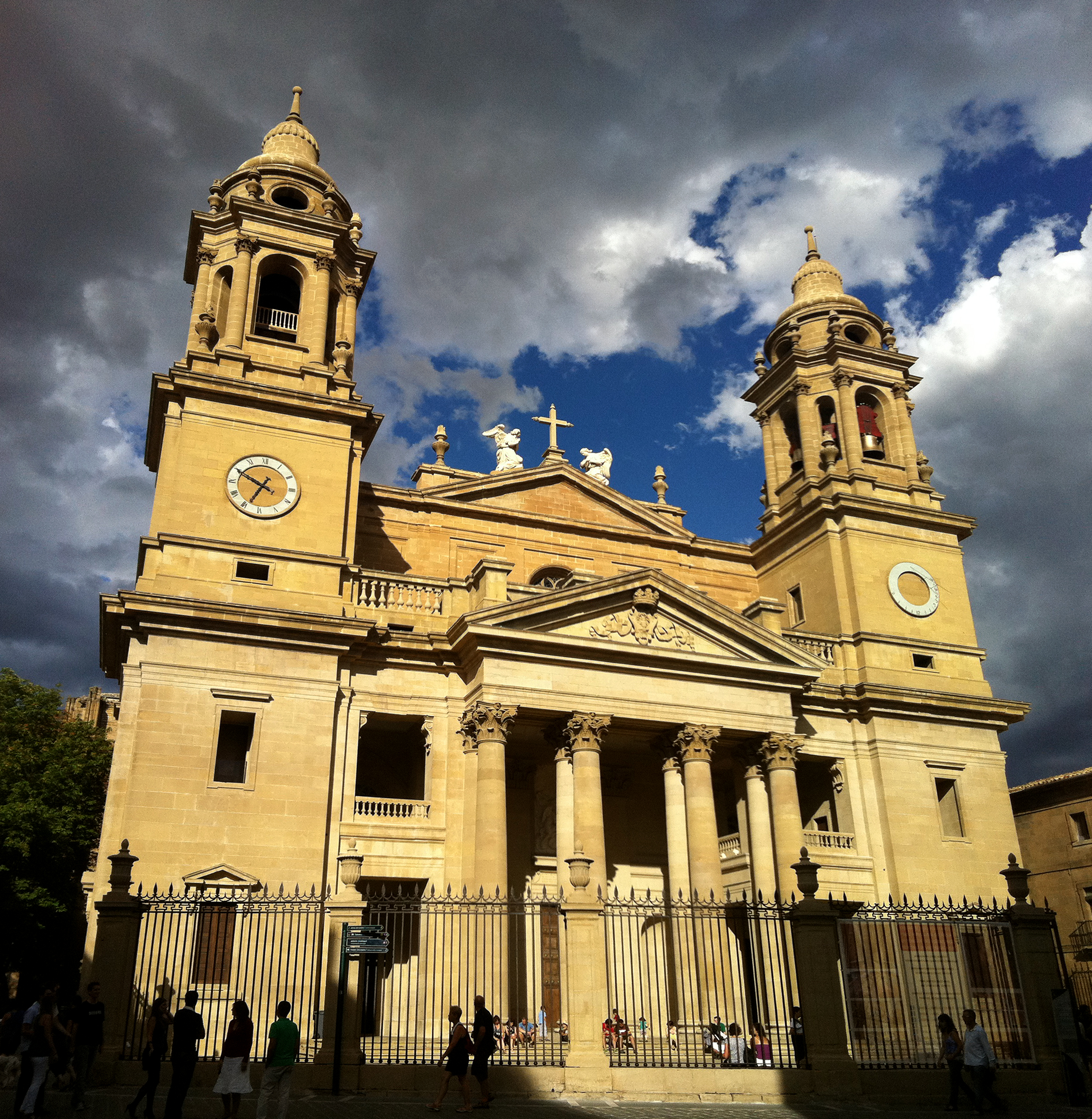 Fachada neoclásica de la catedral de Pamplona, diseñada por Ventura Rodríguez